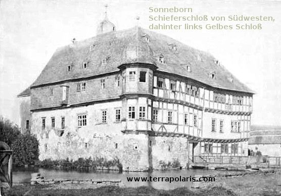 Schieferschloss Sonnenborn